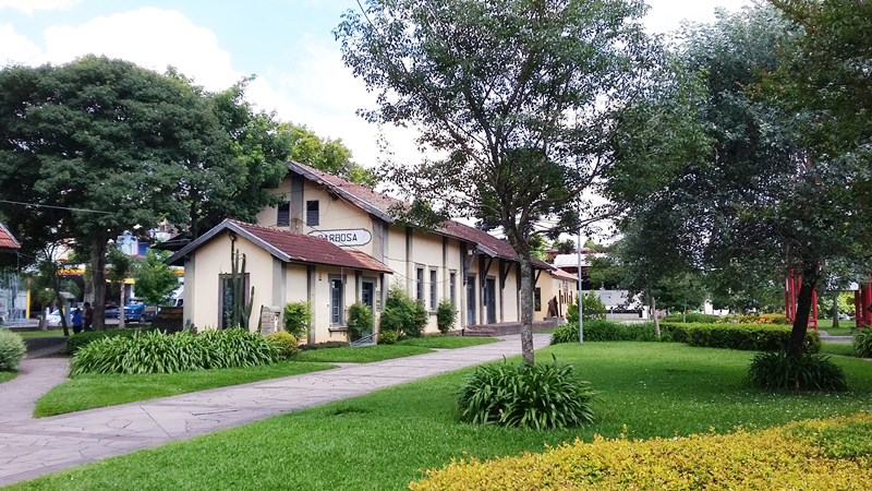 Estação Ferroviária de Carlos Barbosa, construção original,hoje Secretária Municipal de Indústria, Comercio e Turismo da cidade... Parte do Prédio é da Associação Cinema, Cultura e Arte da Cidade, com um cinema.